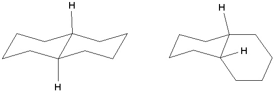 Formas cis e trans Decalina em cadeira